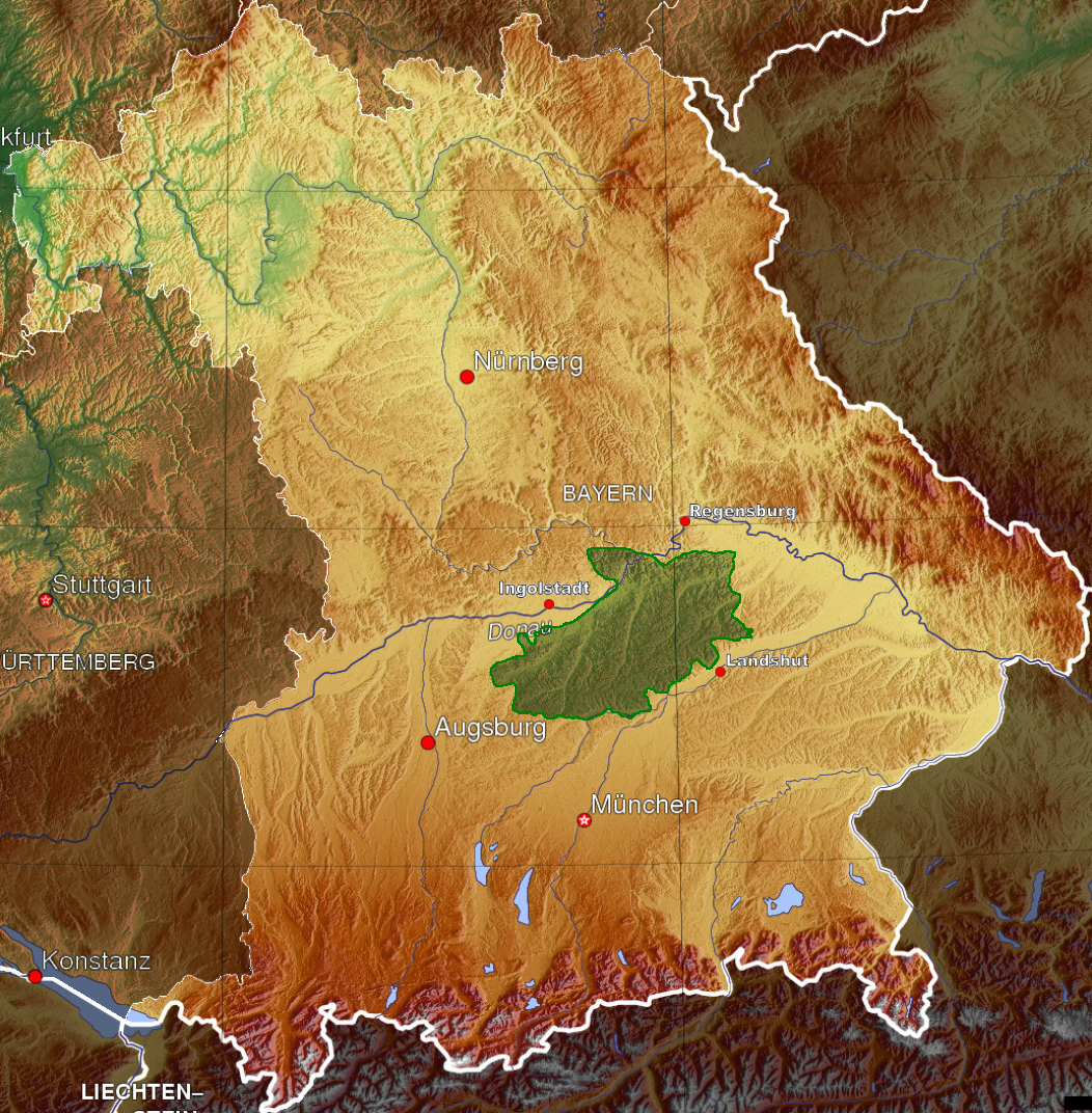 Lagekarte der Hallertau Andere Versionen { }